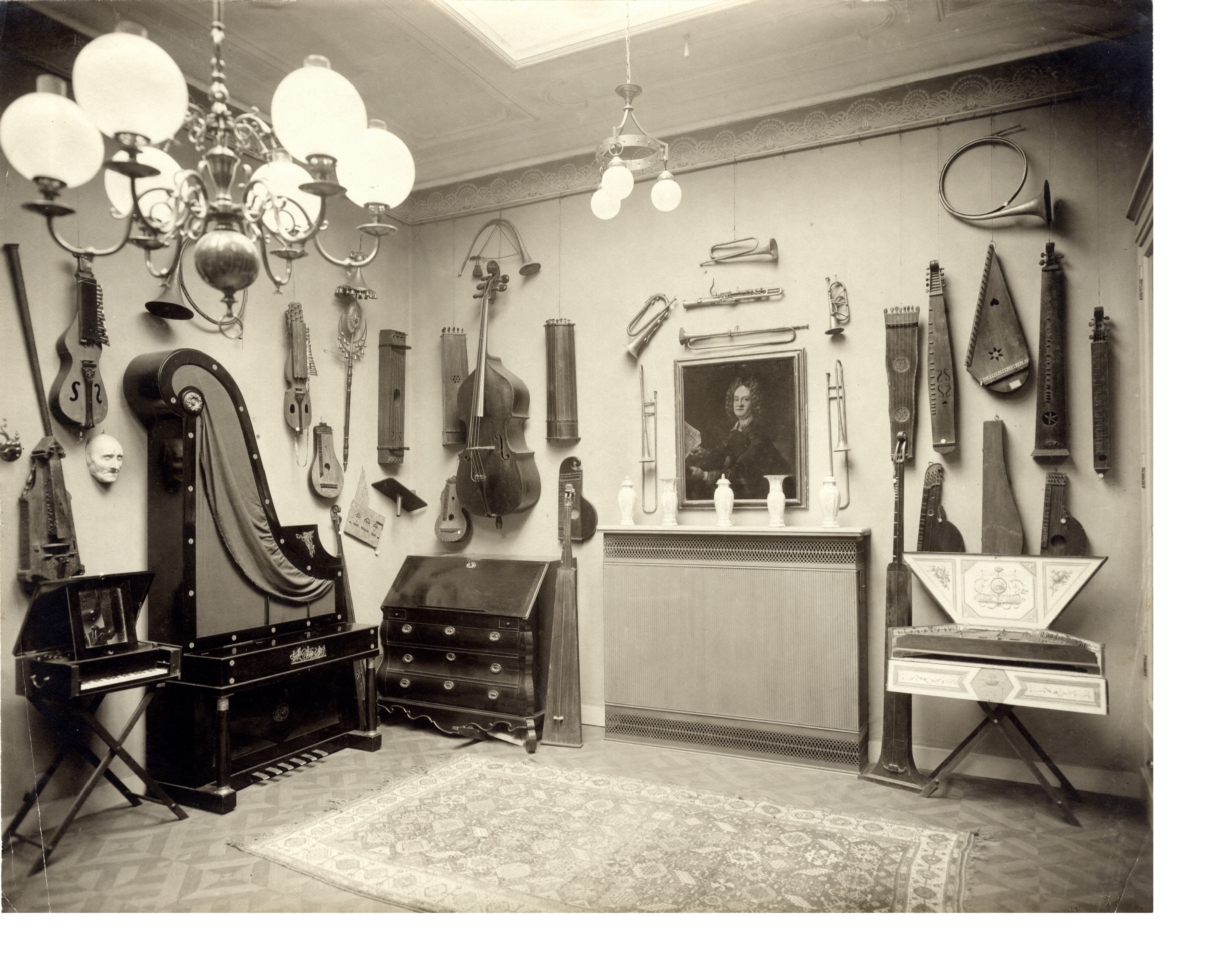 Verder vinden we hier enkele toetsinstrumenten in merkwaardige behuizingen: een giraffepiano van Joannes van Raaij (Amsterdam, ca 1825); daarnaast een naaidoos-piano (ca 1830), onder het dodenmasker van Liszt. Links van de schouw staat een bureau-orgel van H.H. Hess (Gouda, 1776), en aan weerszijden twee exemplaren van de tromba marina (ook bekend als 'Nonnengeige'), een éénsnarig strijkinstrument. Aan de wand citers en andere volksmuziekinstrumenten.